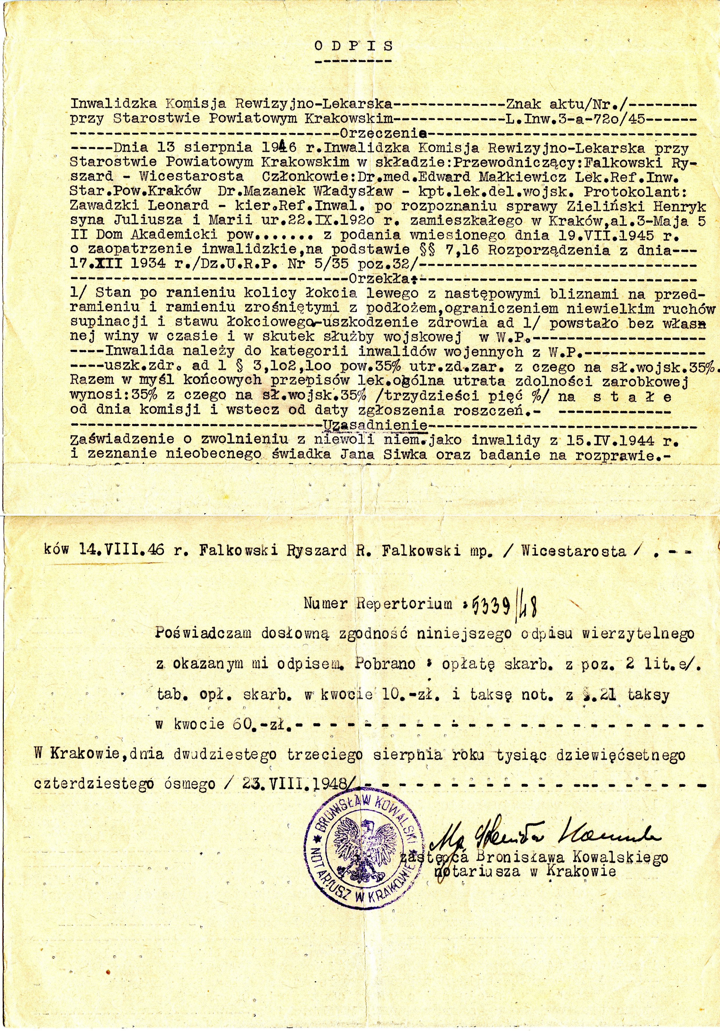 Kopia orzeczenia Komisji Lekarskiej w sprawie Henryka Zielińskiego; w tekście zawarta jest informacja skutkach poniesionych w czasie wojny obrażeń oraz o dacie zwolnienia z obozu jenieckiego: 15.4.1944